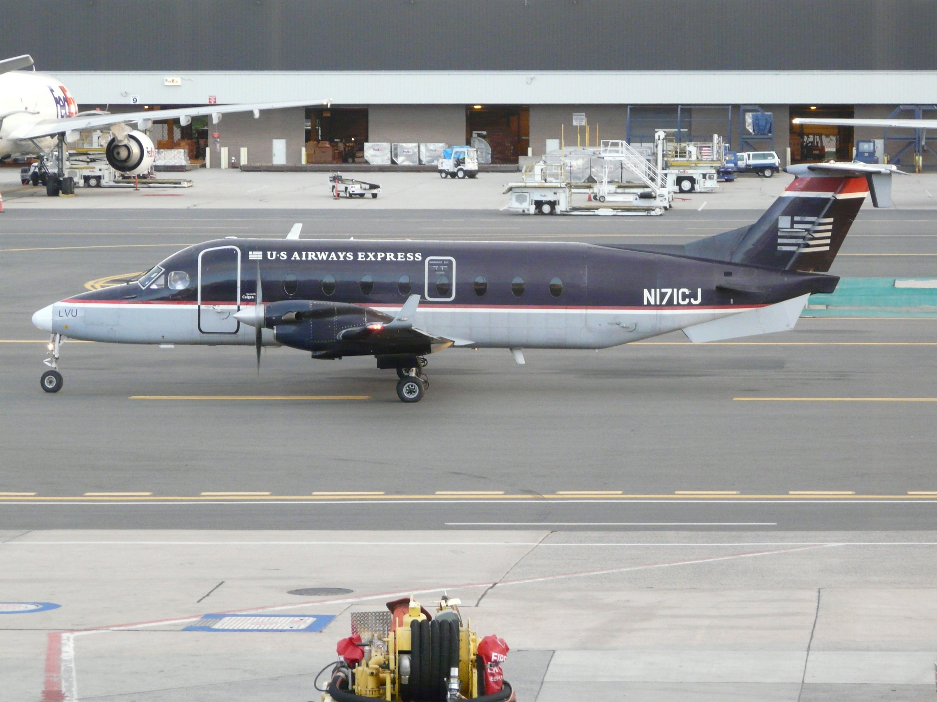 Boston